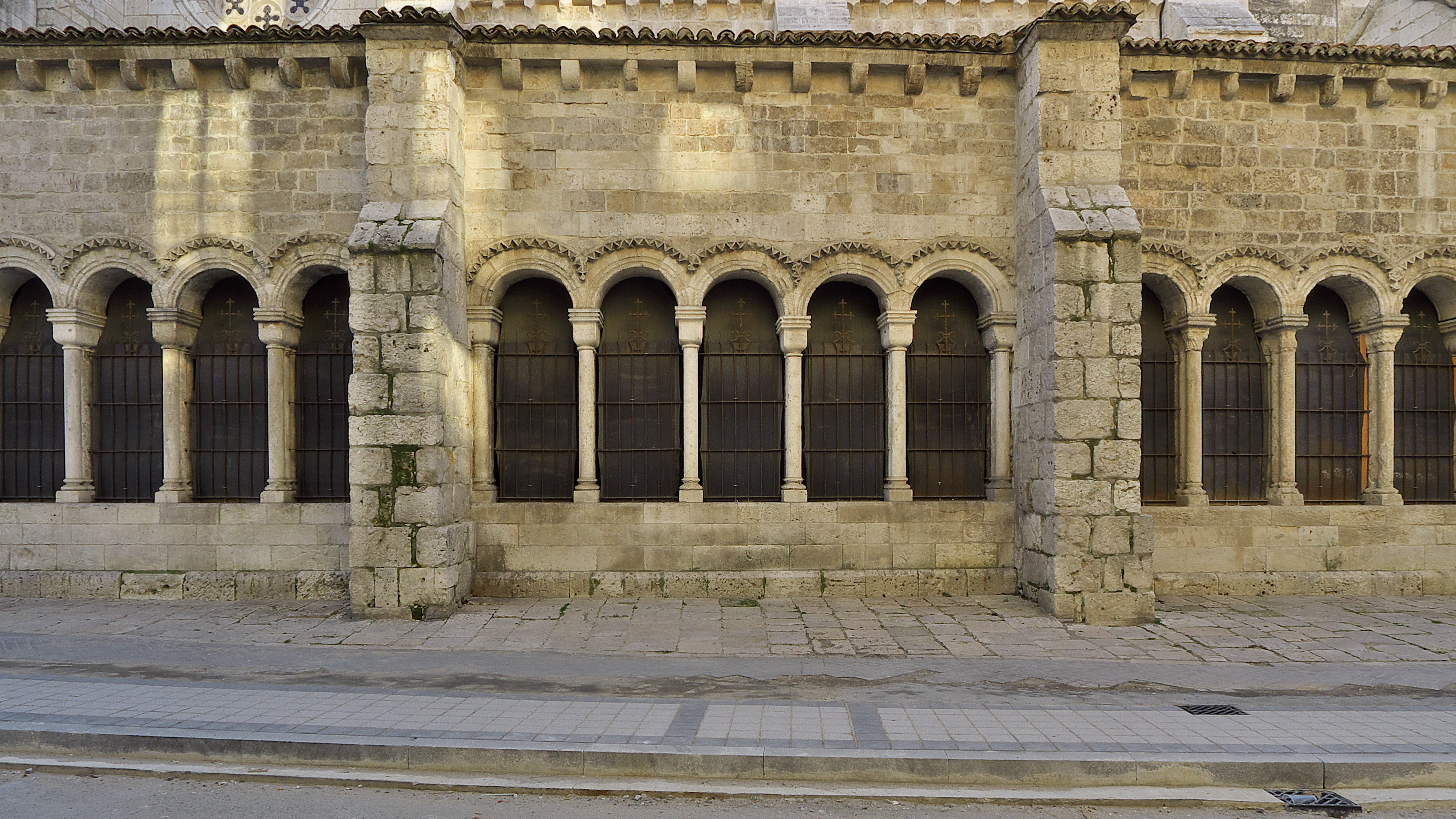 Pórtico situado en la fachada septentrional